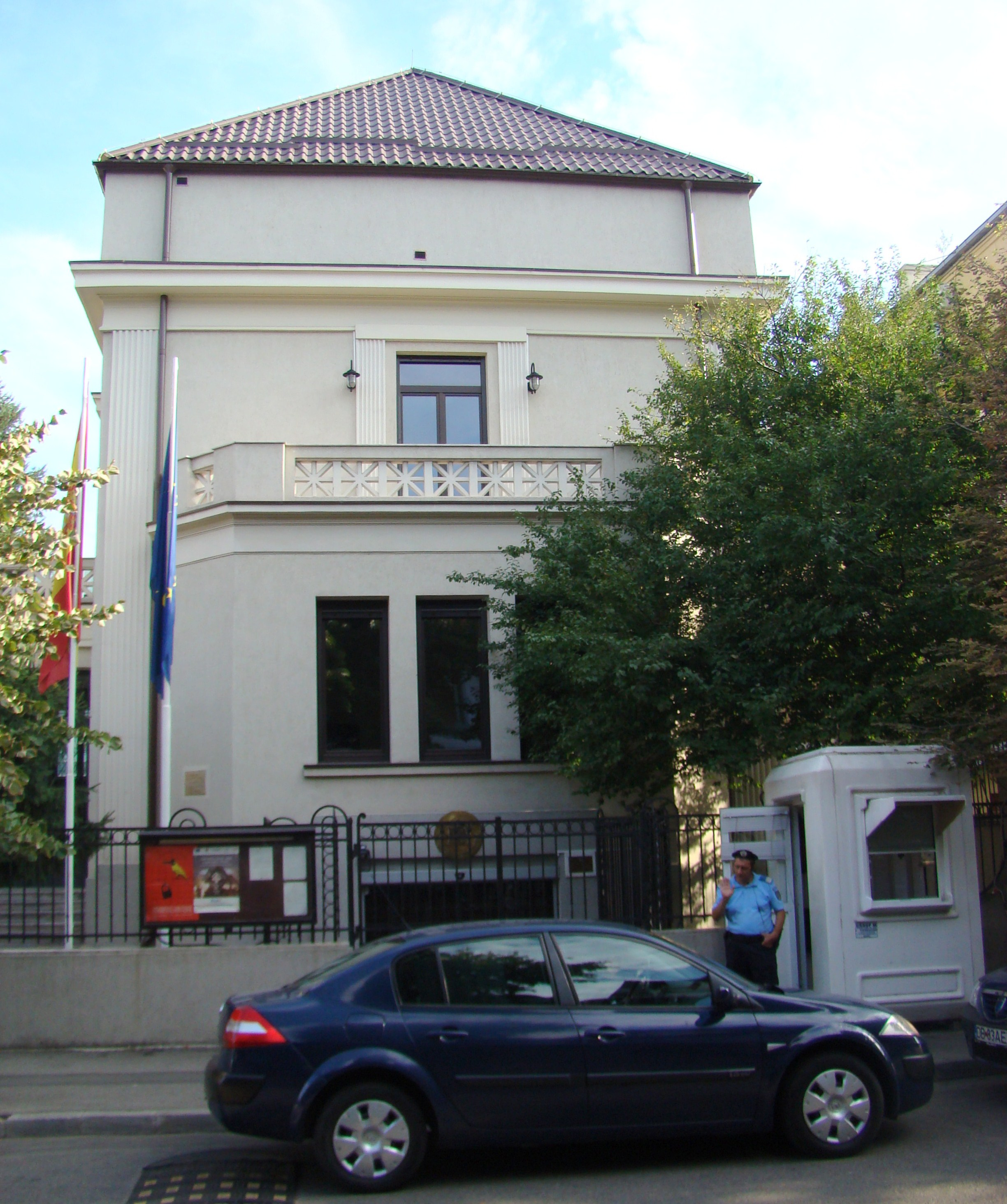 Casă monument istoric, str. Aleea Alexandru, nr. 43 (în prezent Ambasada Spaniei la București)